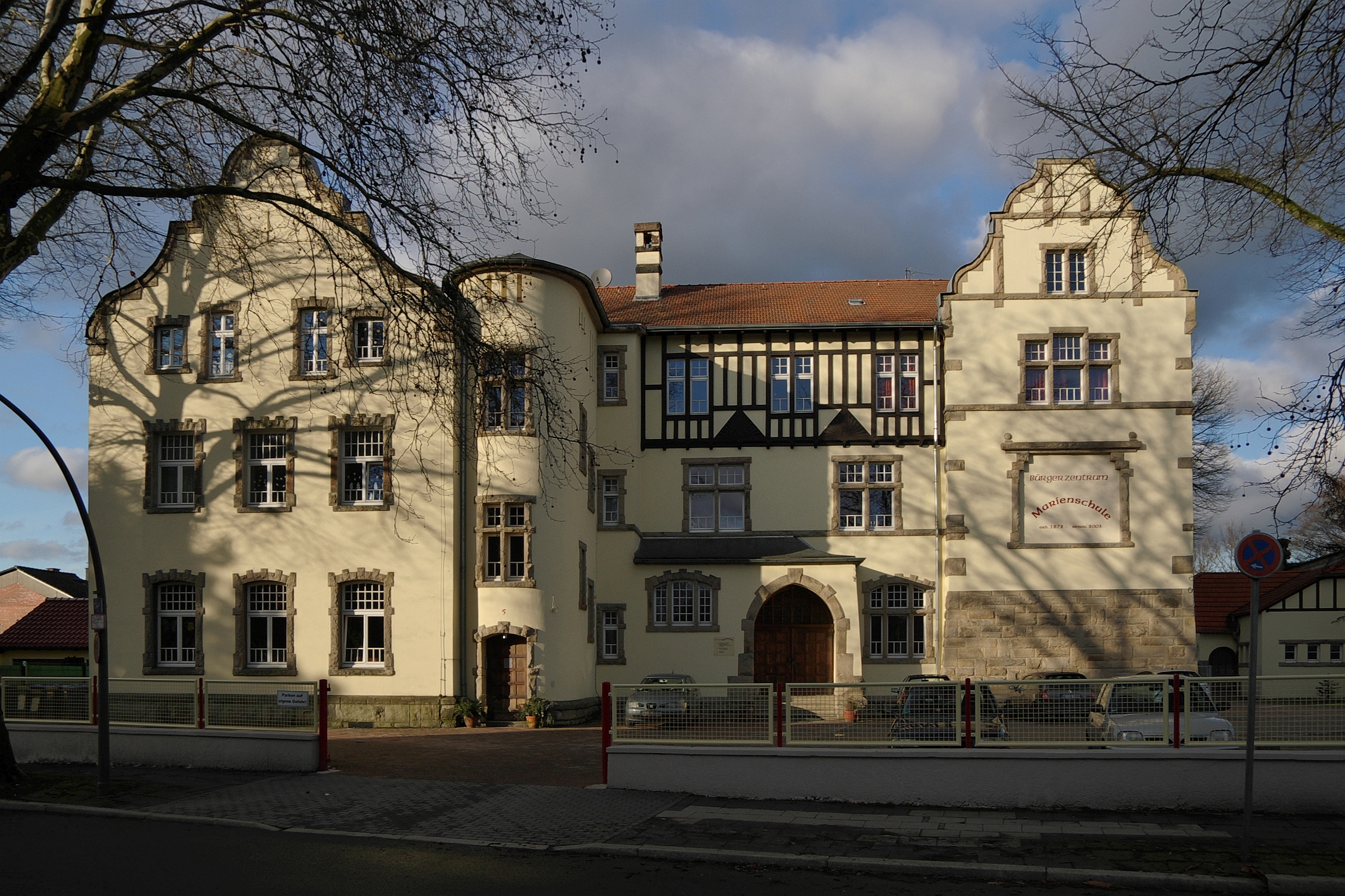 Bürgerzentrum Marienschule, Castrop, Merklinde, Johannesstraße 5, Baudenkmal, Listennummer 32